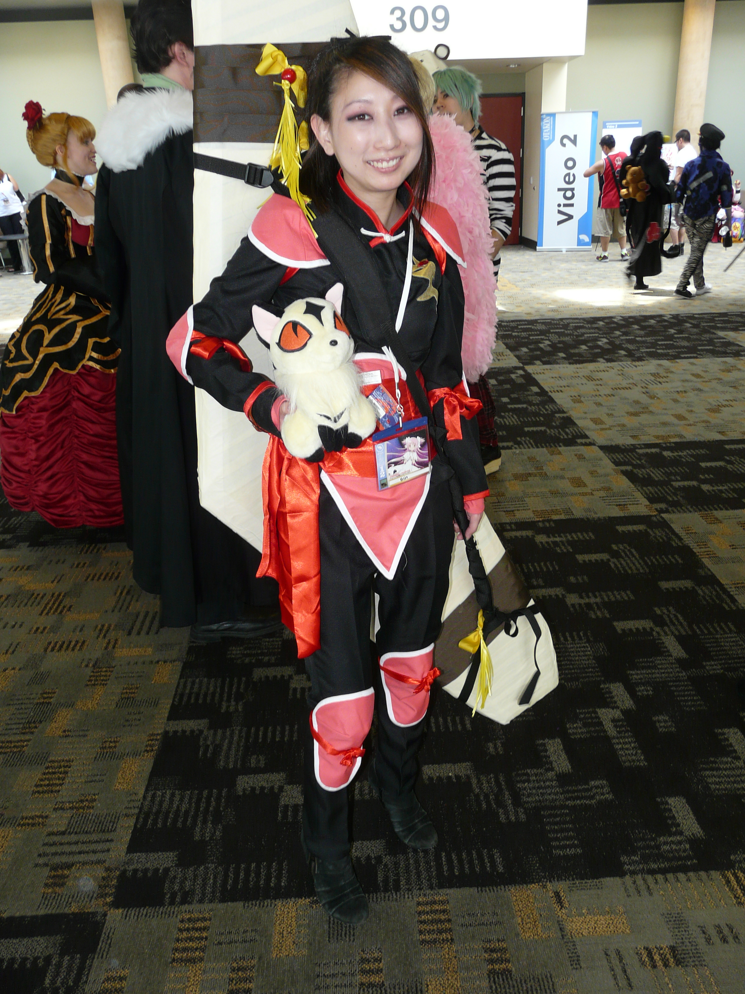 Otakon 2012 cosplay